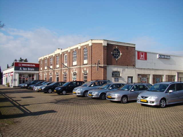 Straat in Bredevoort Knopen/Textielfabriek Bredevoort, Dutch Buttonworks